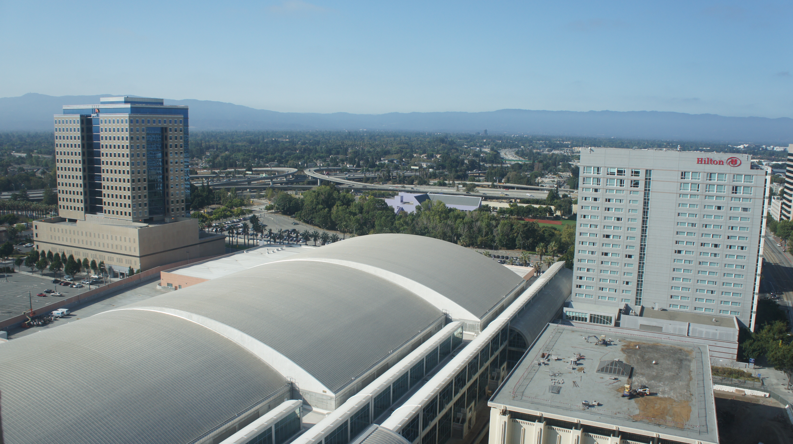 Mozilla All-hands 2011